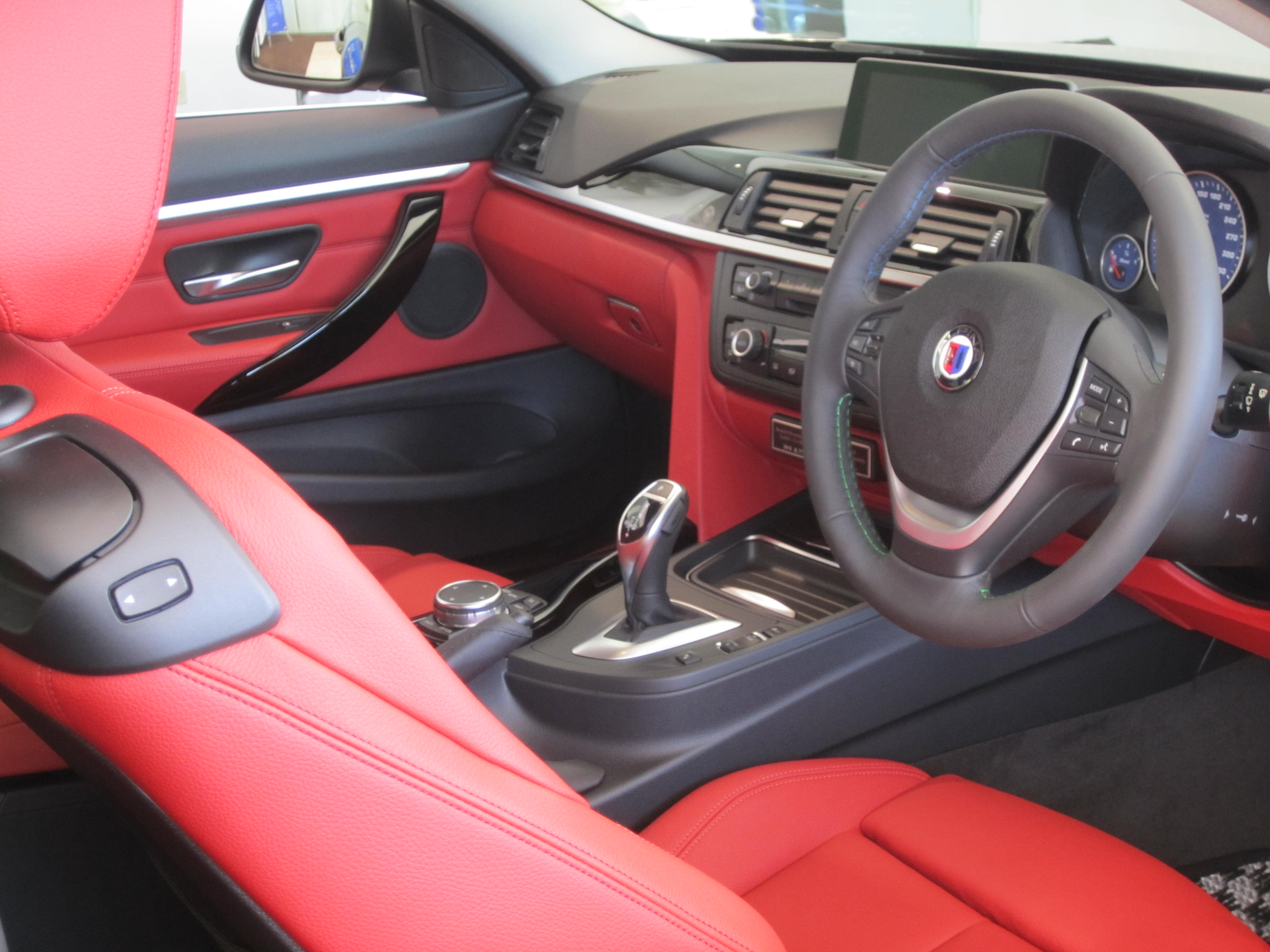 ALPINA D4 インテリア